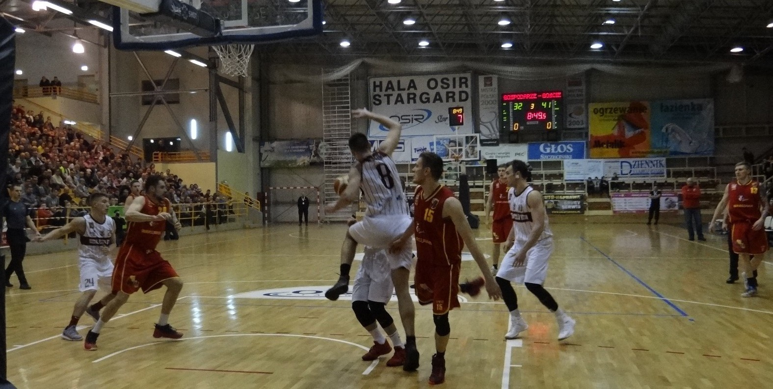 Spójnia w meczu z KK Warszawa